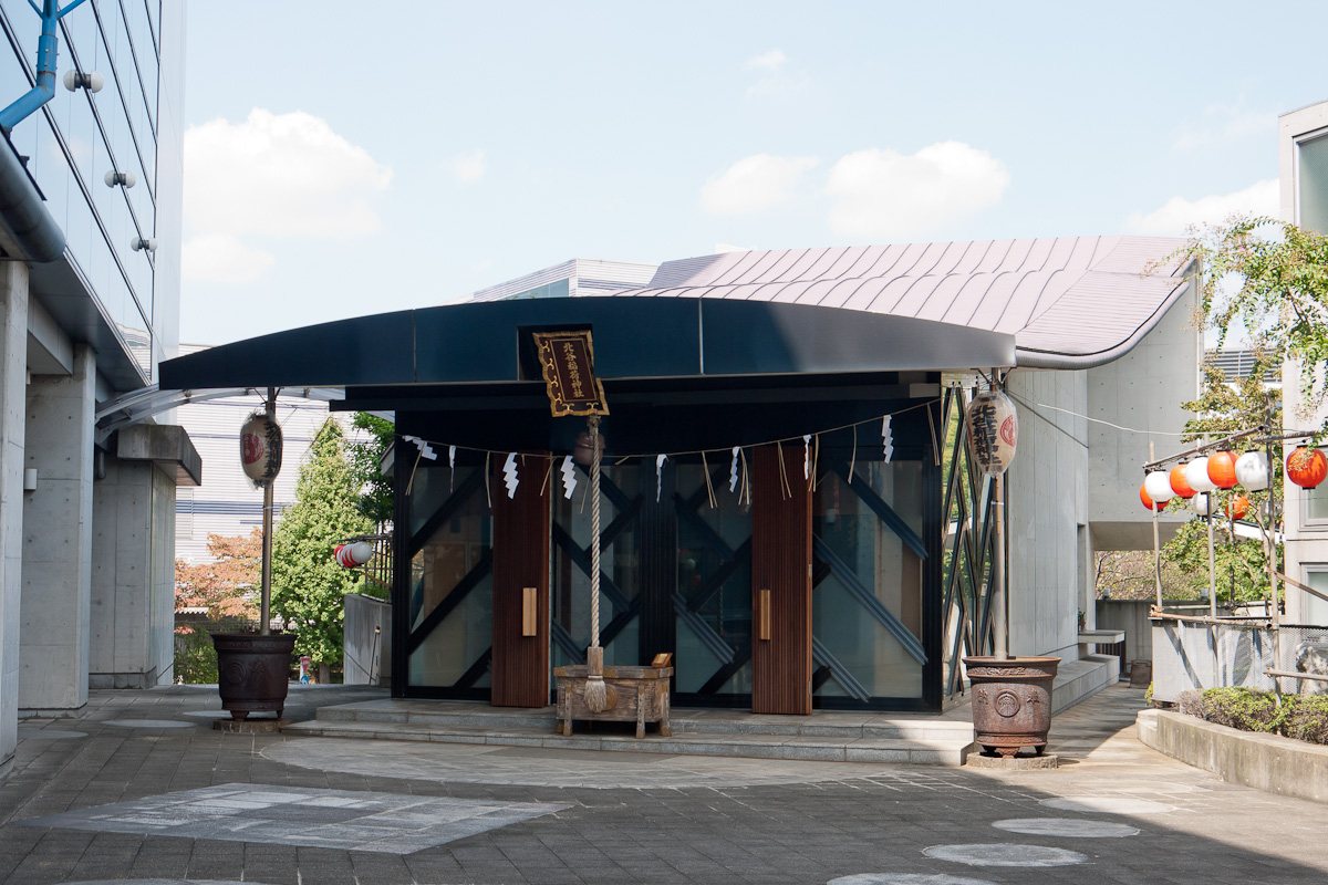 「北谷稲荷神社」東京都渋谷区神南1丁目。